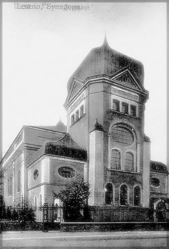 Nowa Synagoga w Lesznie